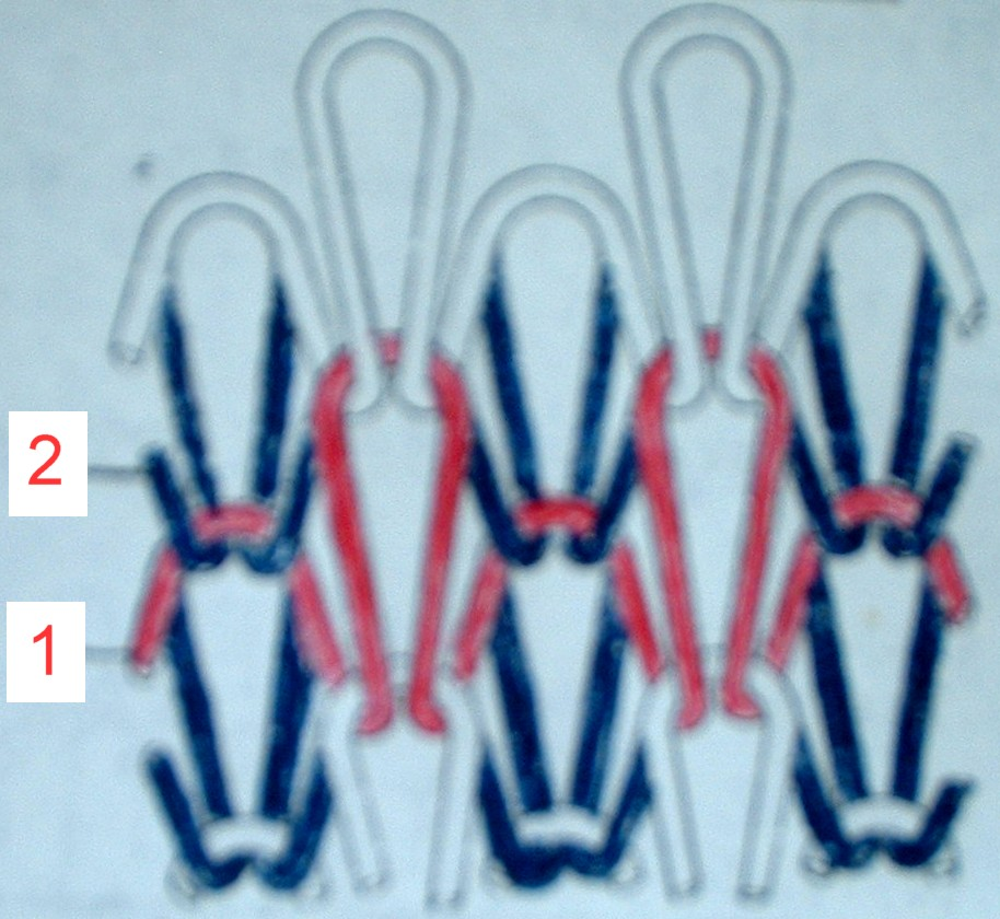 Maschenbild der RR-Fangbindung im Gestrick